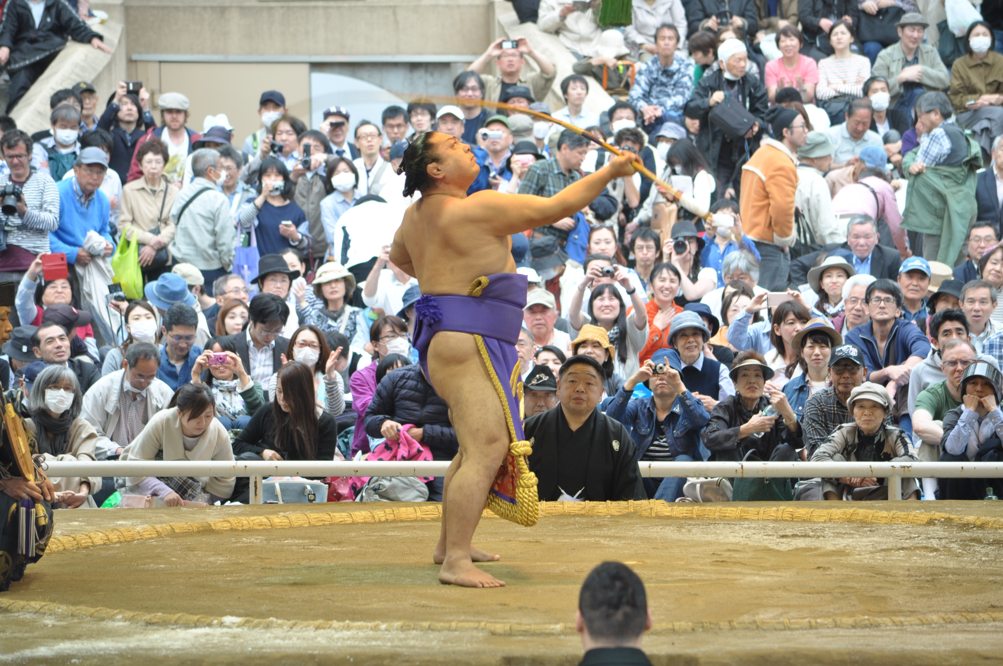 聡ノ富士 久志